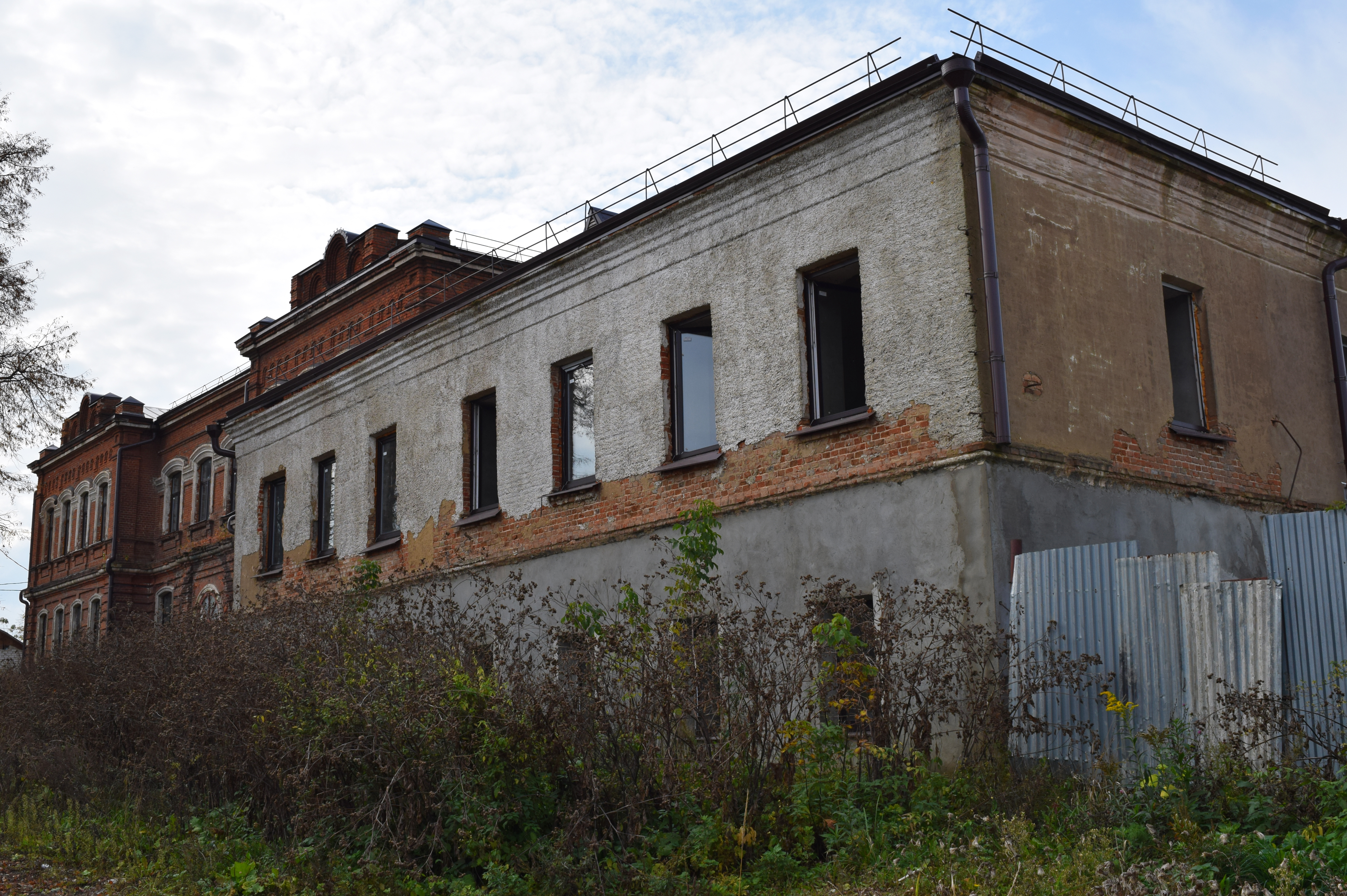 Здание Скопинского духовного училища: улица Октябрьская, 26, Скопин, Рязанская область